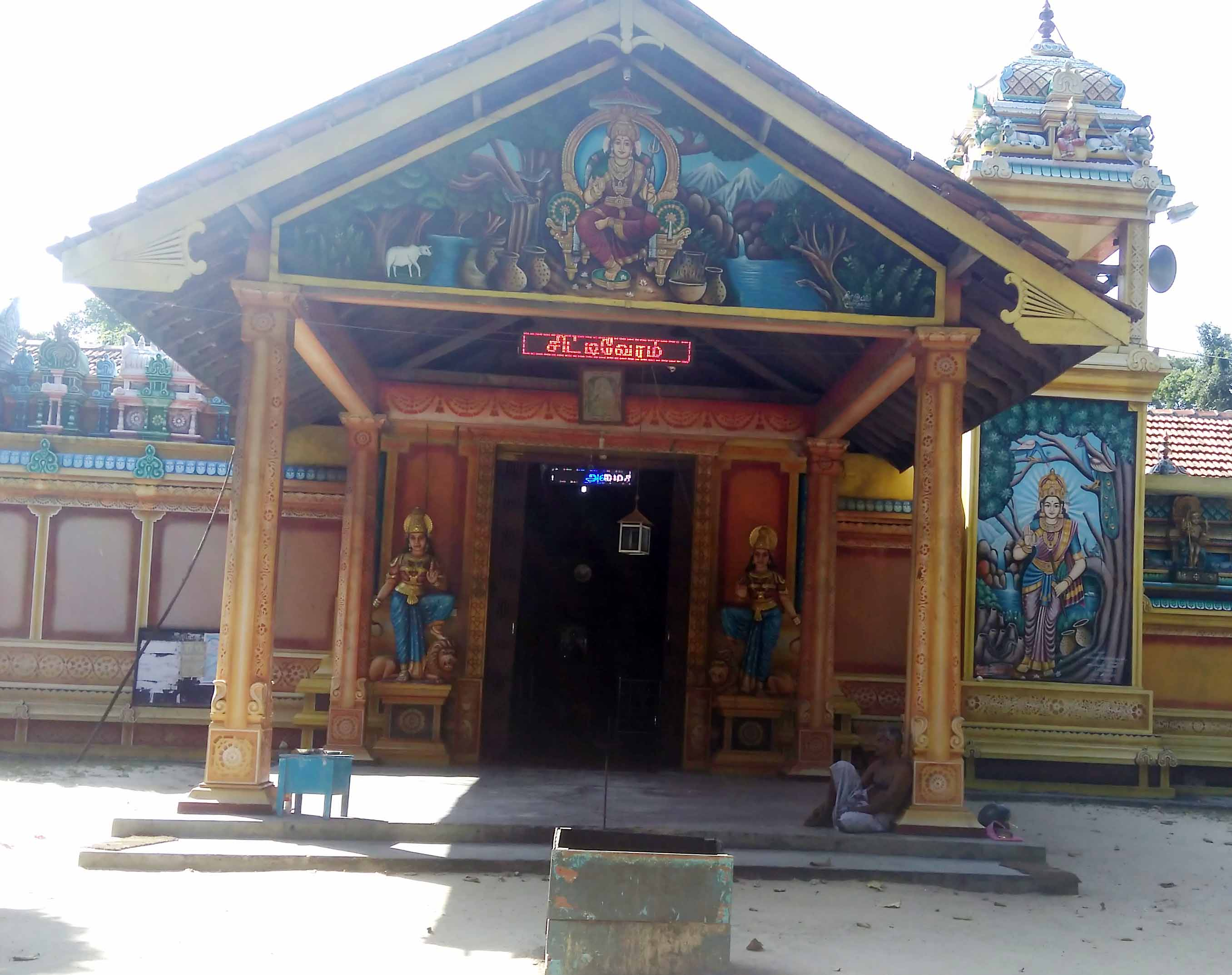 ஆலய முன்தோற்றம்